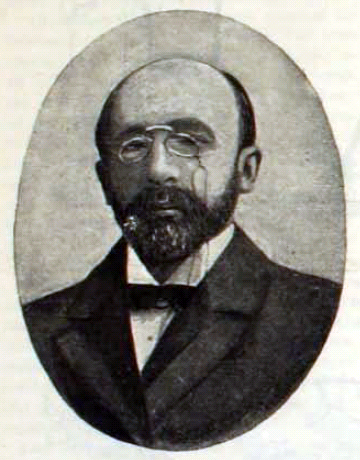 José Toribio Medina Zavala (Santiago; 21 de octubre de 1852 – 11 de diciembre de 1930) Bibliógrafo e Historiador chileno, el mayor recolector de fuentes para el estudio de la historia de su país.